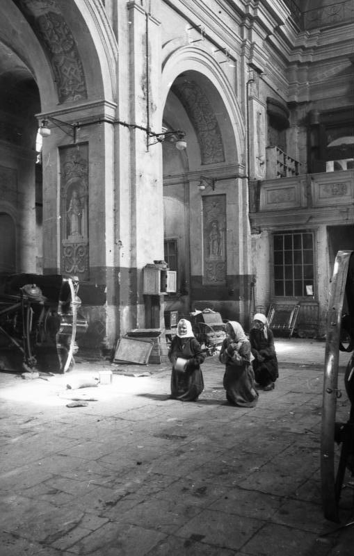 Information added by Wikimedia users.Беларуская (тарашкевіца): У Катэдральным марыінскім касьцёле (цяпер Архікатэдральны касьцёл Імя Найсьвяцейшай Панны Марыі): тры жанчыны моляцца, стоячы на каленях на падлозе. Менск, БССР. Чэрвень 1941 году.